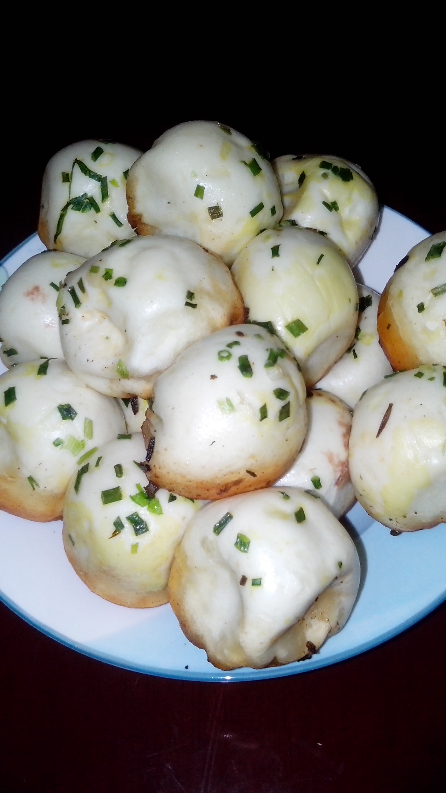 从丰裕生煎购买的生煎馒头